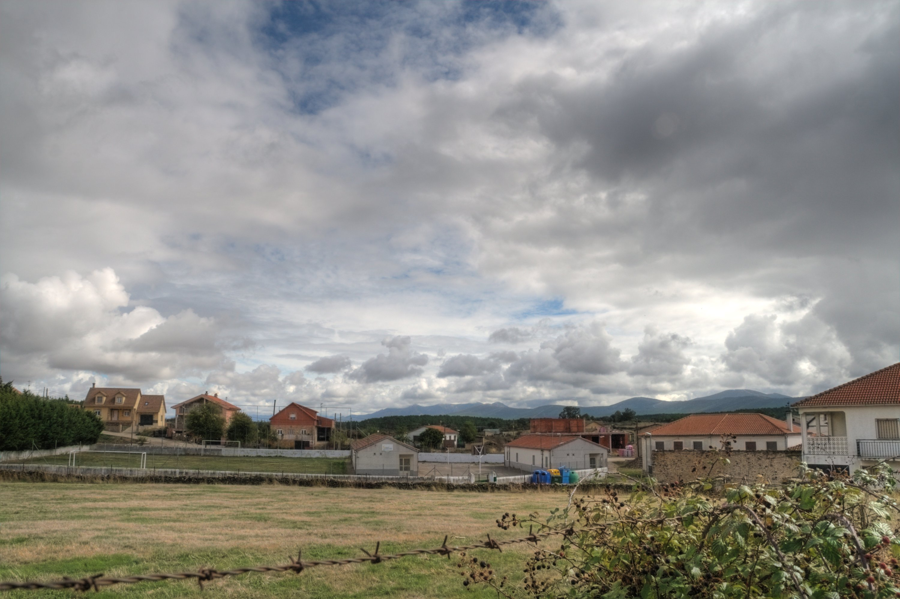 Vista de Robleda, en Salamanca, España.